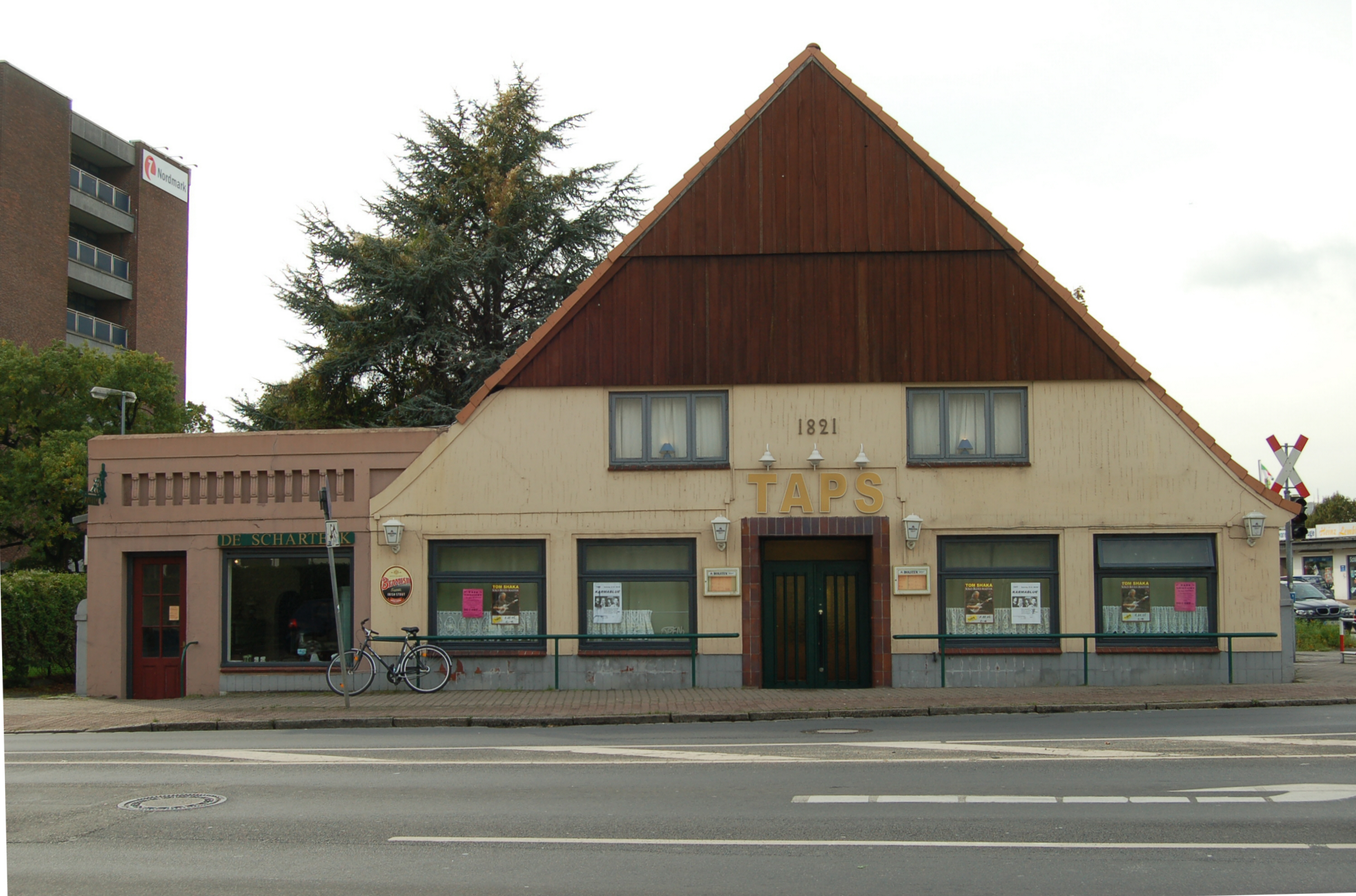 Das Taps in Uetersen, eine der wenigen Szenekneipen im Kreis Pinneberg. Das Gebäude steht unter Denkmalschutz und wurde 1821 erbaut.